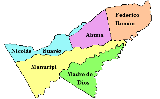 Carte du département de Pando en Bolivie